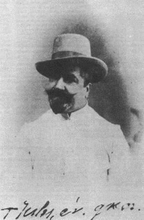 "T[au] Jules, év[êque] gnos[tique]".